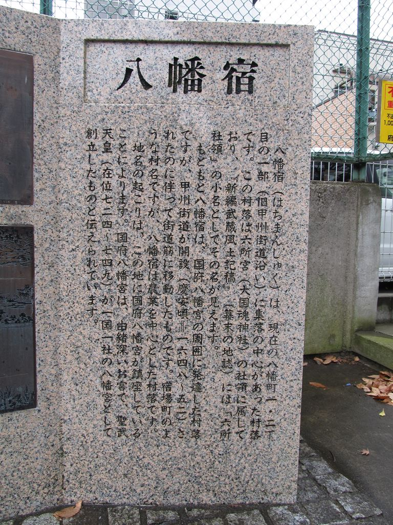 八幡宿。東京都府中市八幡町、八幡町交差点。